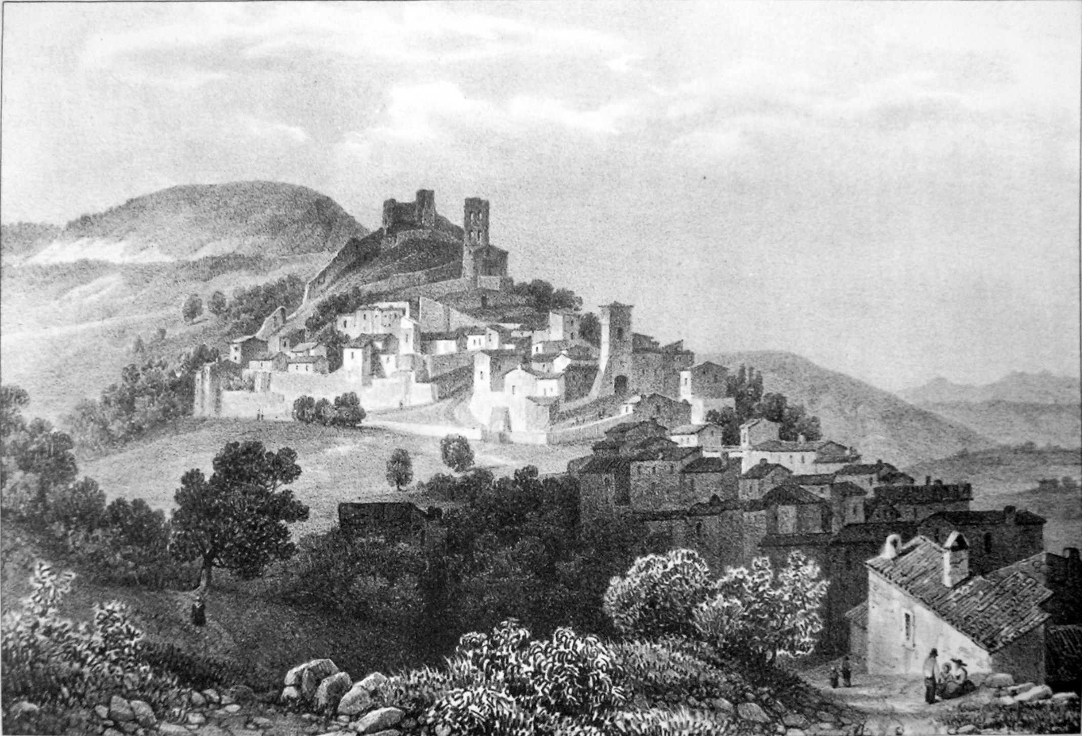 Marsanne (Drome) ATTENTION ! Ce facsimilé est réalisé en applicant des alterations avec un logiciel graphique à une copie numérique, obtenue à partir d'une prise de photo faite par un non-professionnel. Elle pourrait ne pas être parfaitement réussie.